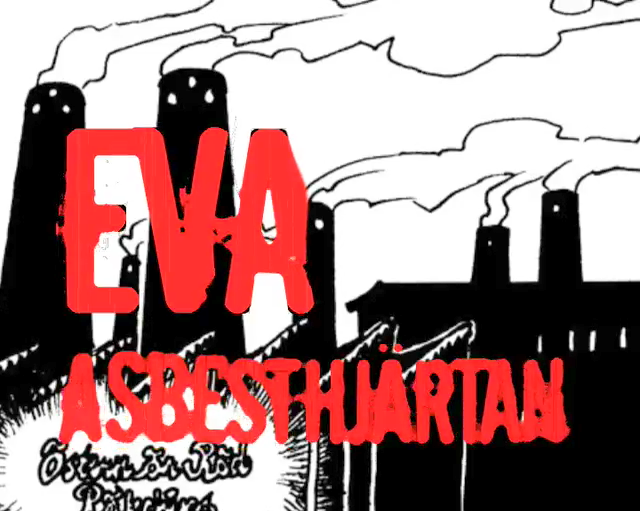 Bild ur kortfilmen "Eva - Asbesthjärtan", baserad på Tinet Elmgrens tecknade serie.